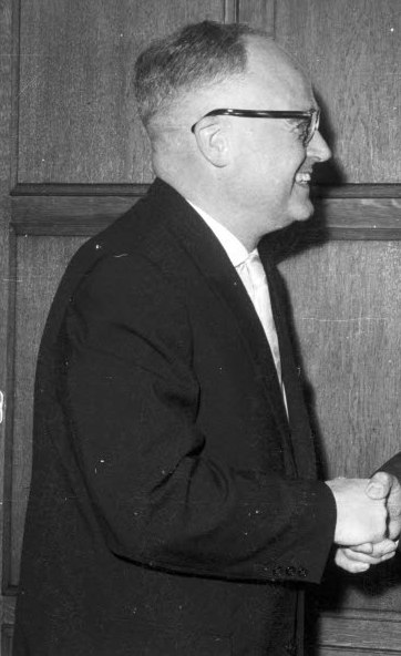 Kultusminister Edo Osterloh (links) gratuliert dem ehemaligen Rektor der Pädagogischen Hochschule (PH) Prof. Dr. Paul-Gerhard Bohne (rechts) zum Großen Verdienstkreuz des Verdienstordens der Bundesrepublik Deutschland.